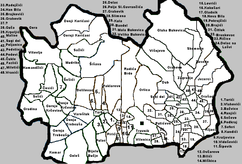 Na ovoj slici je prikazana općina Travnik sa svojim naseljima prema teritoriji Bosne i Hercegovine iz 1991 godine.